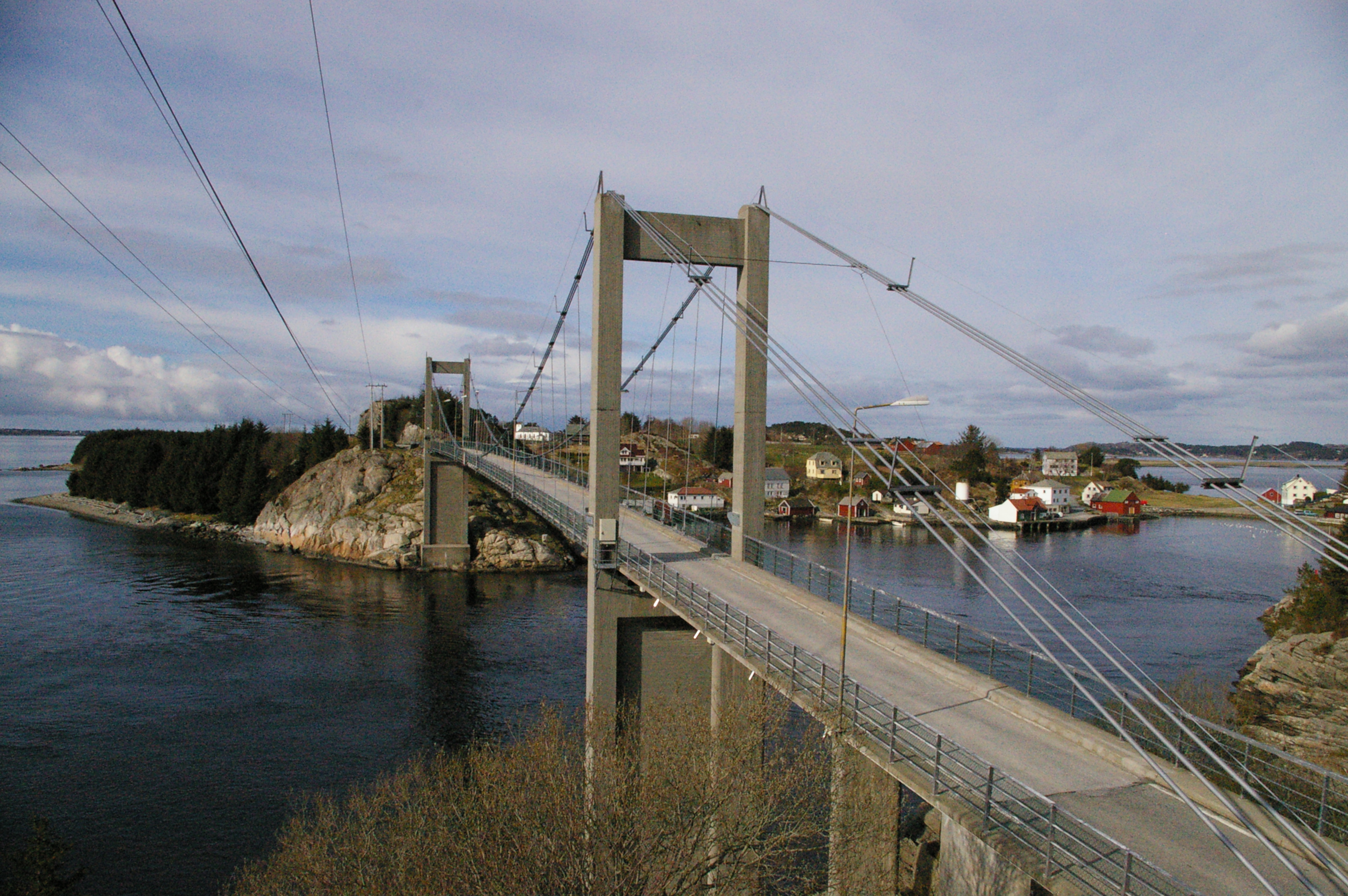 Brua over til Herdla